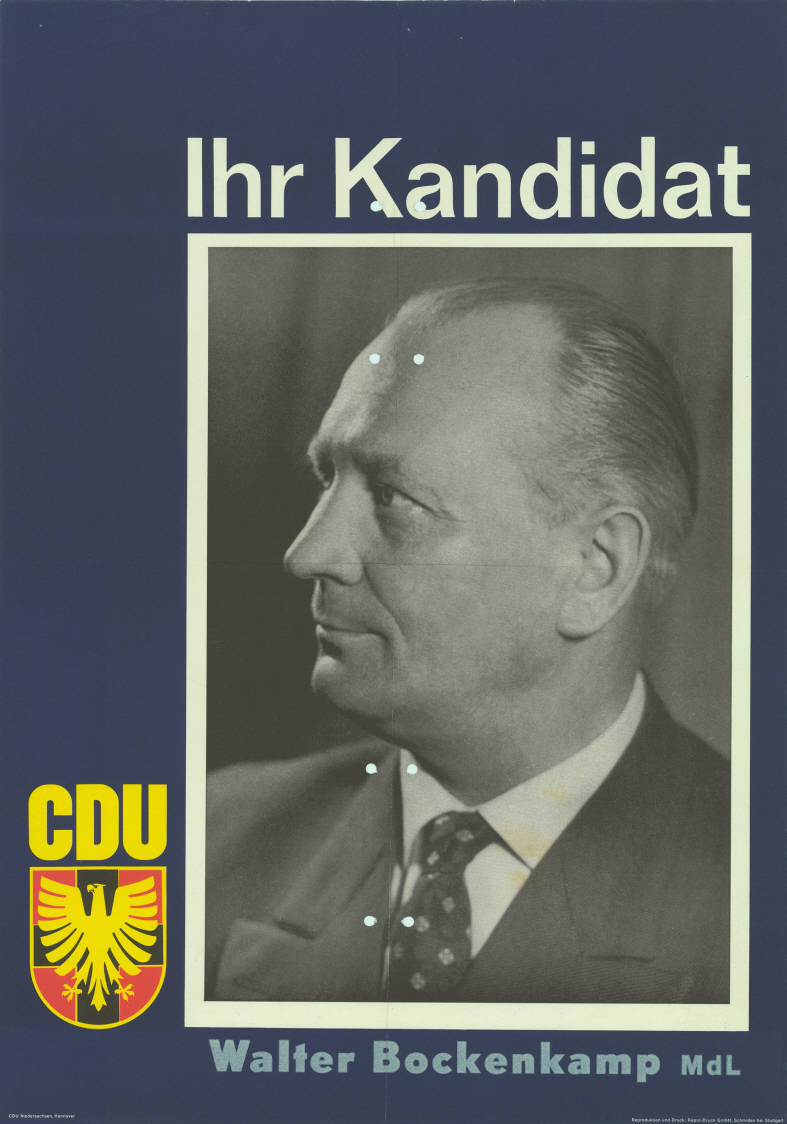 Ihr Kandidat CDU Walter Bockenkamo DdL Abbildung: Porträtfoto Plakatart: Kandidaten-/Personenplakat mit Porträt Auftraggeber: CDU Niedersachsen, Hannover Drucker_Druckart_Druckort: Repro-Druck, Schmiden bei Stuttgart Objekt-Signatur: 10-008 : 224 Bestand: Landtagswahlplakate Niedersachsen (10-008) GliederungBestand10-18: Landtagswahlplakate Niedersachsen (10-008) » CDU Lizenz: KAS/ACDP 10-008 : 224 CC-BY-SA 3.0 DE